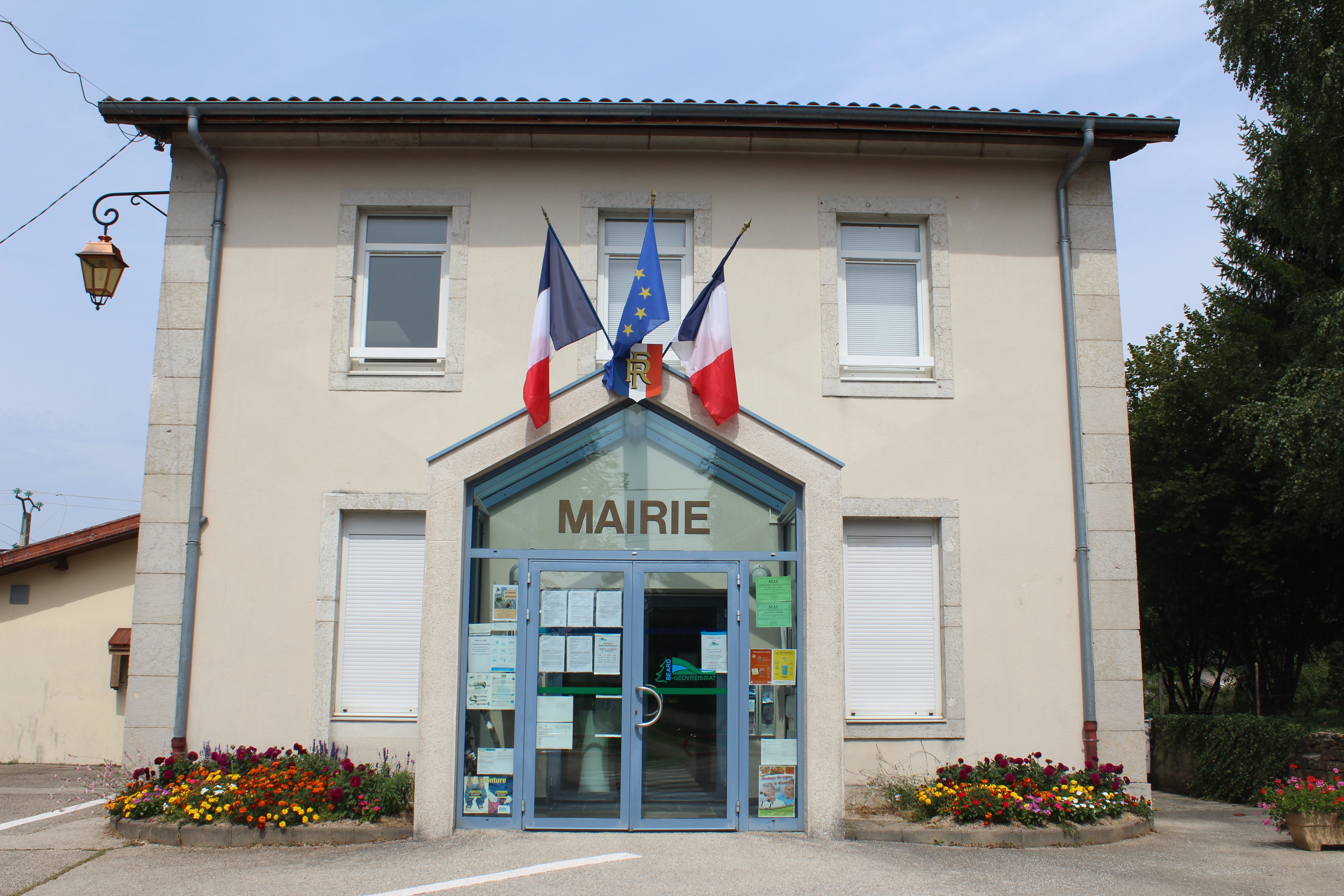 Mairie de Béard-Géovreissiat